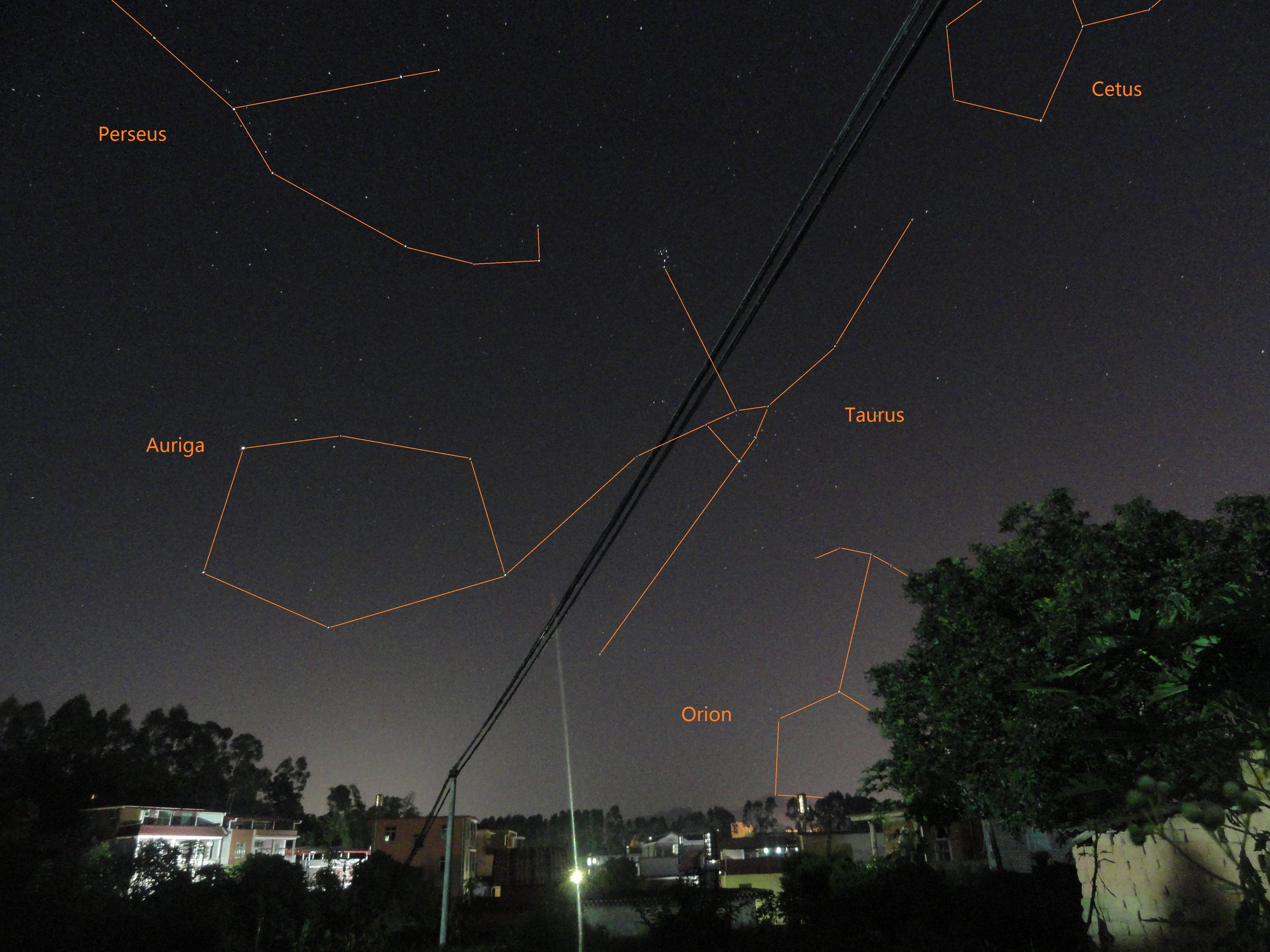 在中国福建省南安市梅山镇拍摄的冬季夜空